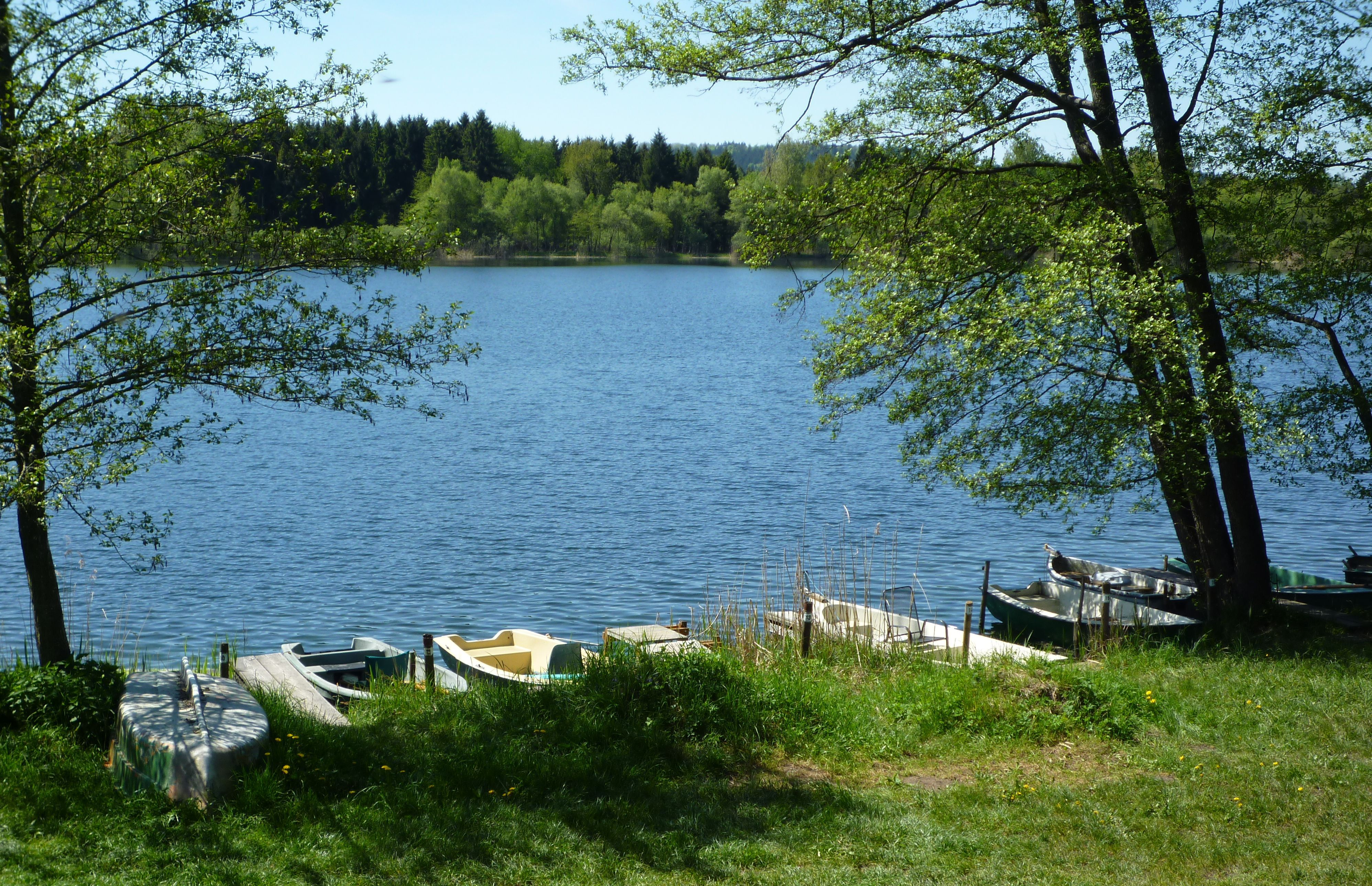 Blick über den Ruschweiler See, Ruderboote am Ufer im Vordergrund, Naturschutzgebiet „Ruschweiler und Volzer See“ (NSG 4.162) in Illmensee, Baden-Württemberg